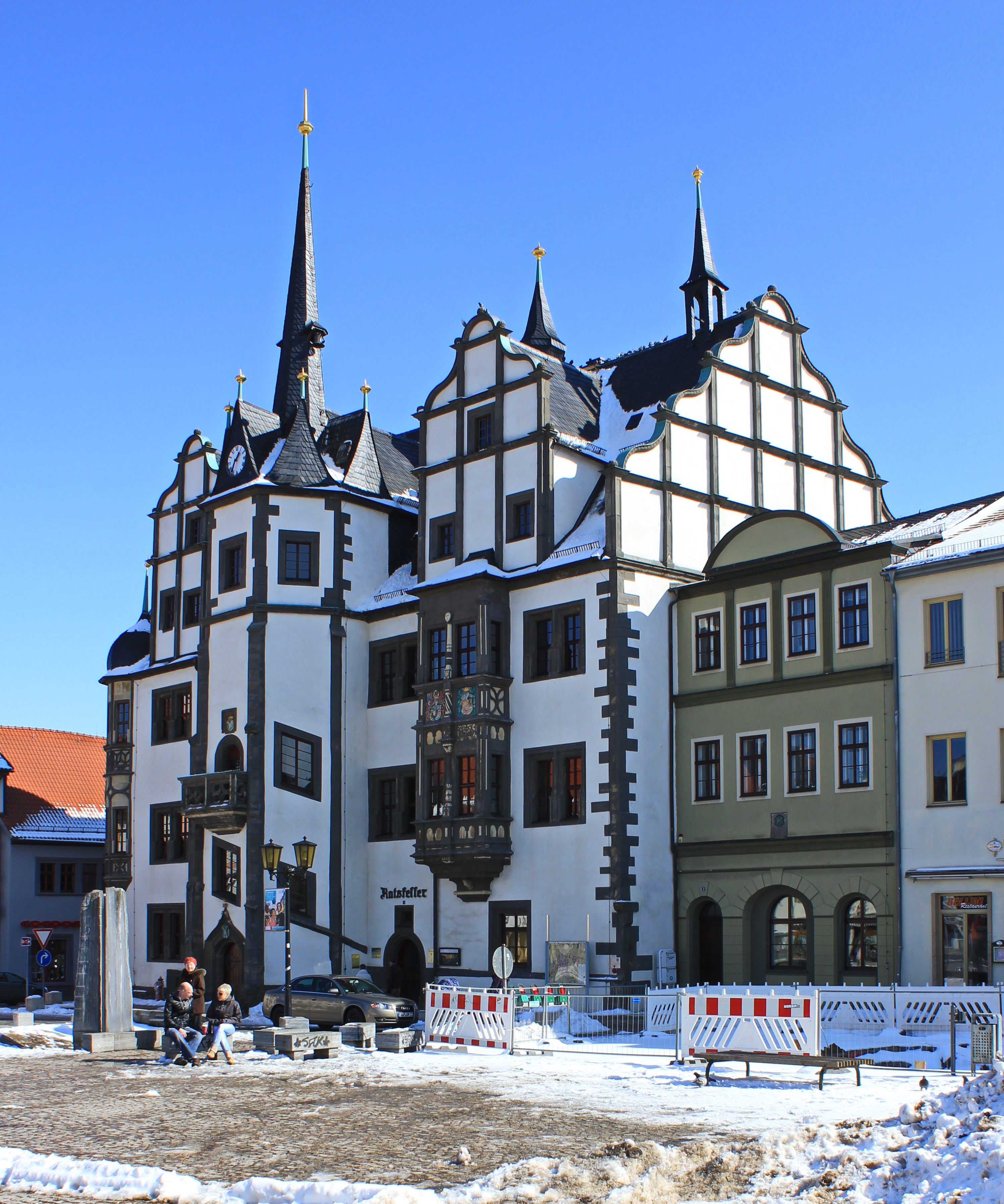 Rathaus in Saalfeld an der Saale, Thüringen.